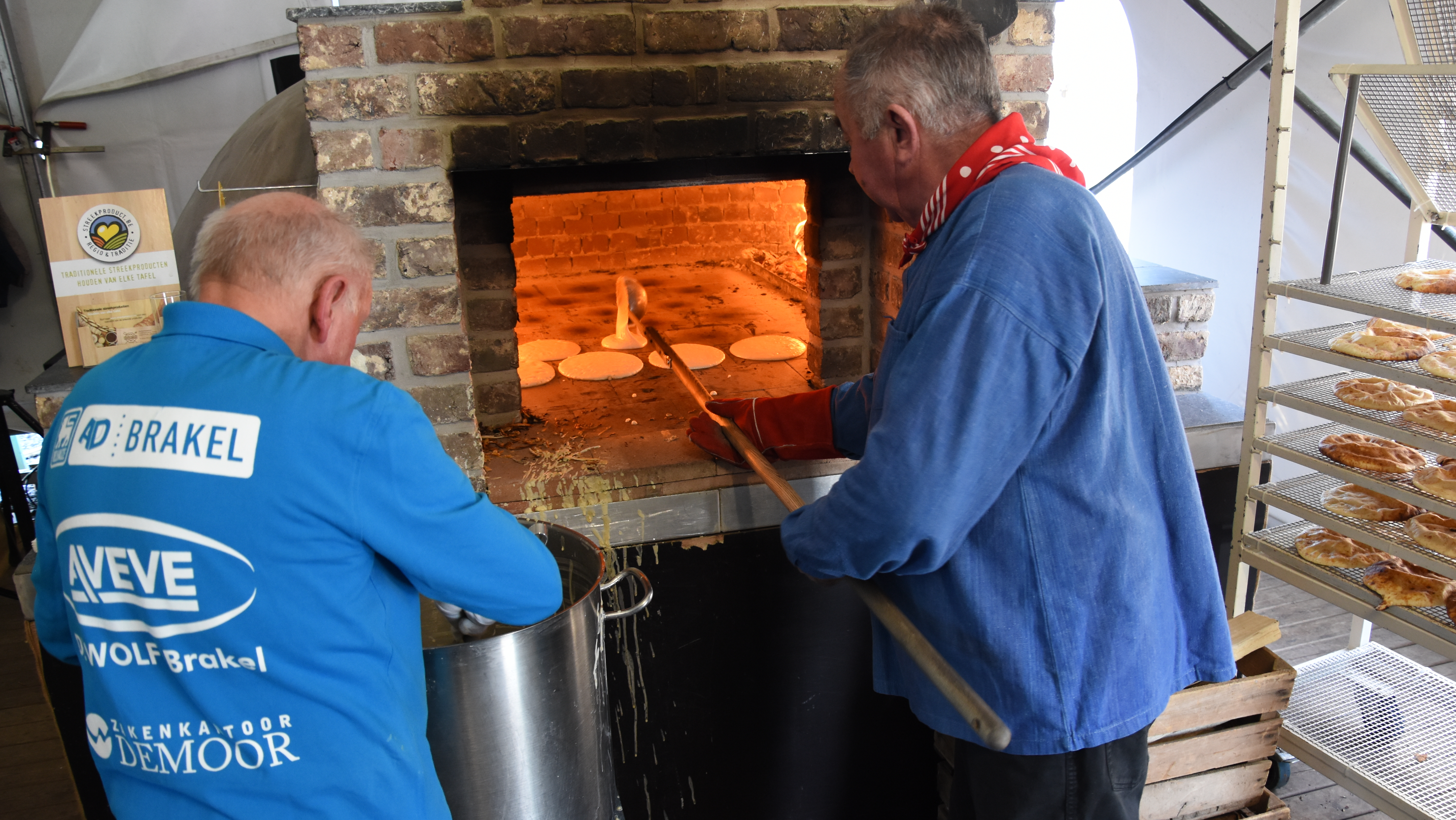 Geutelingen in Michelbeke